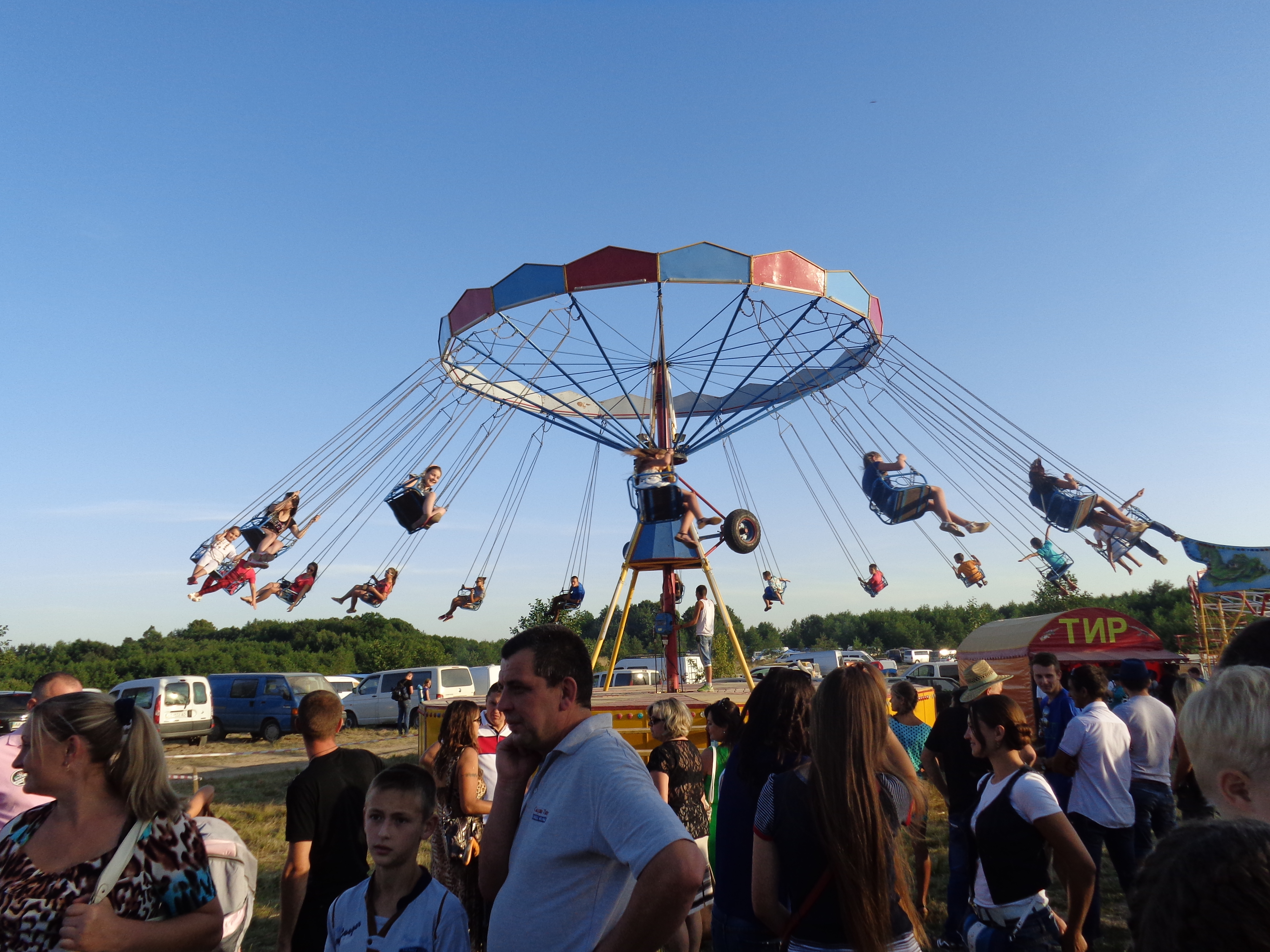 Атракціони на фестивалі лемківської культури "Дзвони Лемківщини".